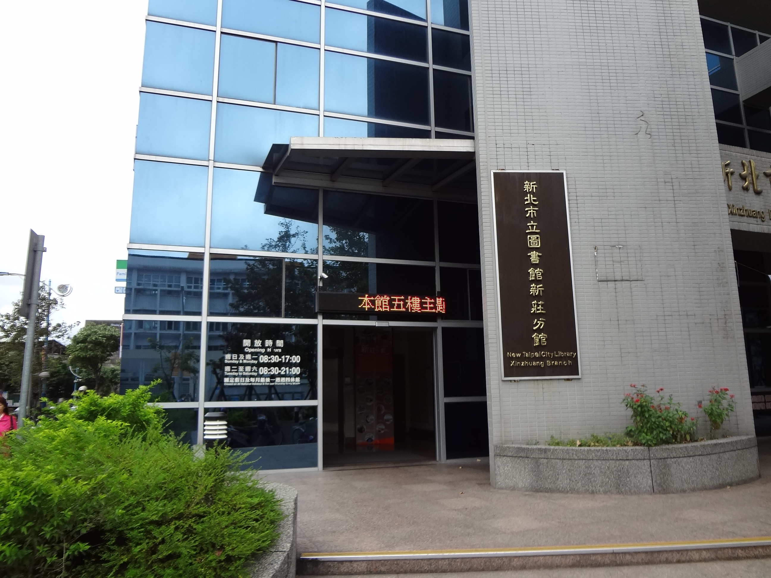 中文（台灣）: 新北市立圖書館新莊分館，位於新北市新莊區中華路一段2號5至6樓。